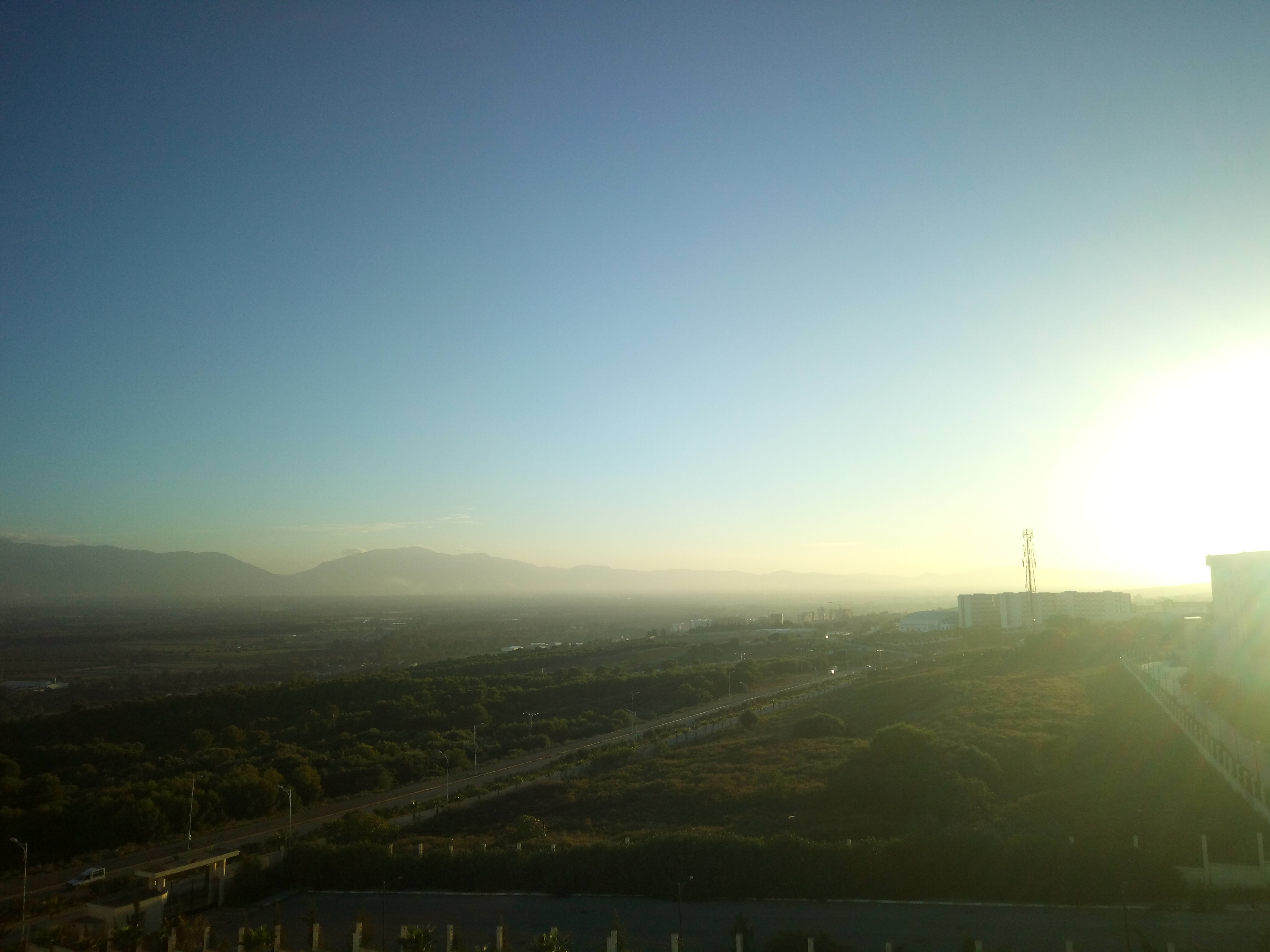 Vue depuis les hauteurs de la commune de Koléa au sein du nouveau campus universitaire, sur la plaine de la Mitidja, les montagnes de Chréa, ainsi que l'accès aux gorges de la Chiffa (territoire de la Wilaya de Blida).